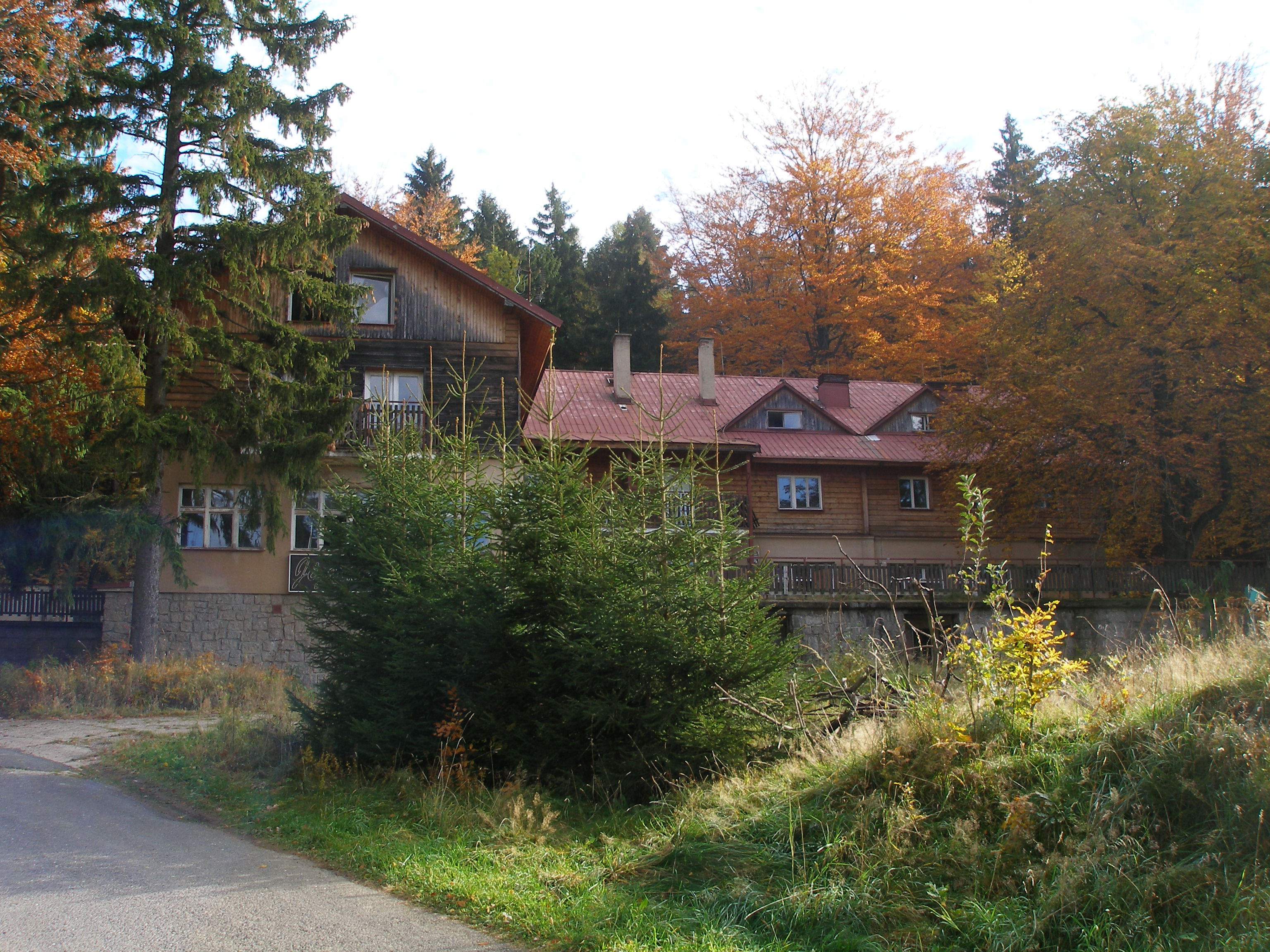 Chata Jizerka (dříve podniková chata SEPAP Štětí).